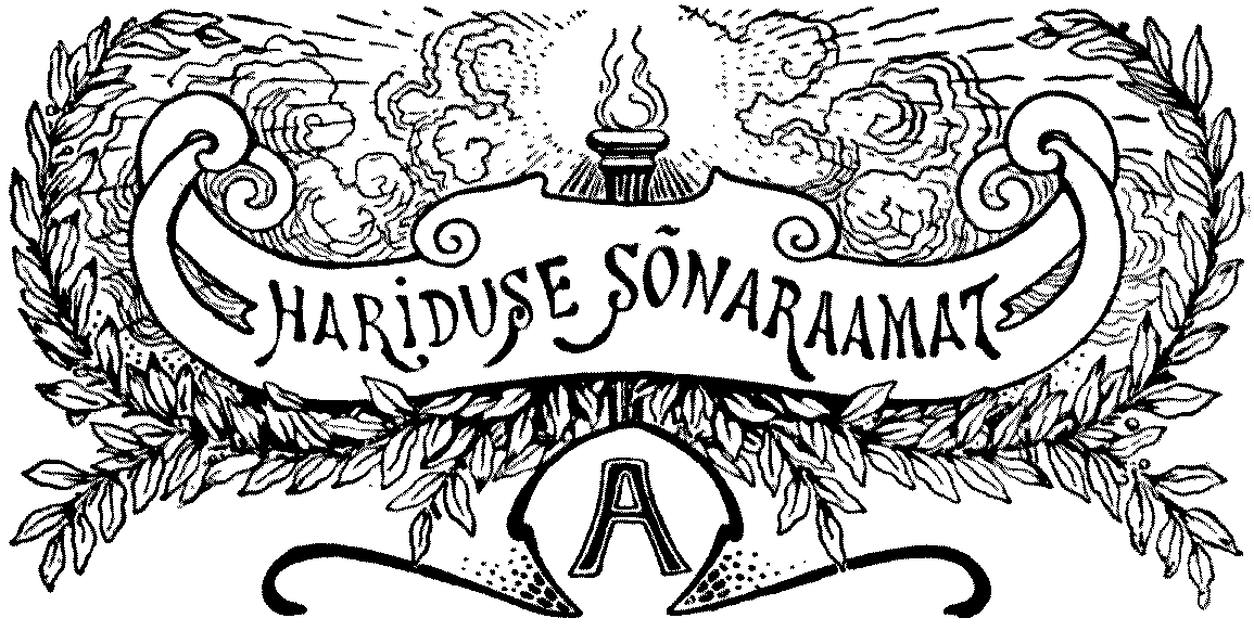 Illustratsioon raamatust Hariduse sõnaraamat / Toimetanud J. Muide.Tartu 1908.